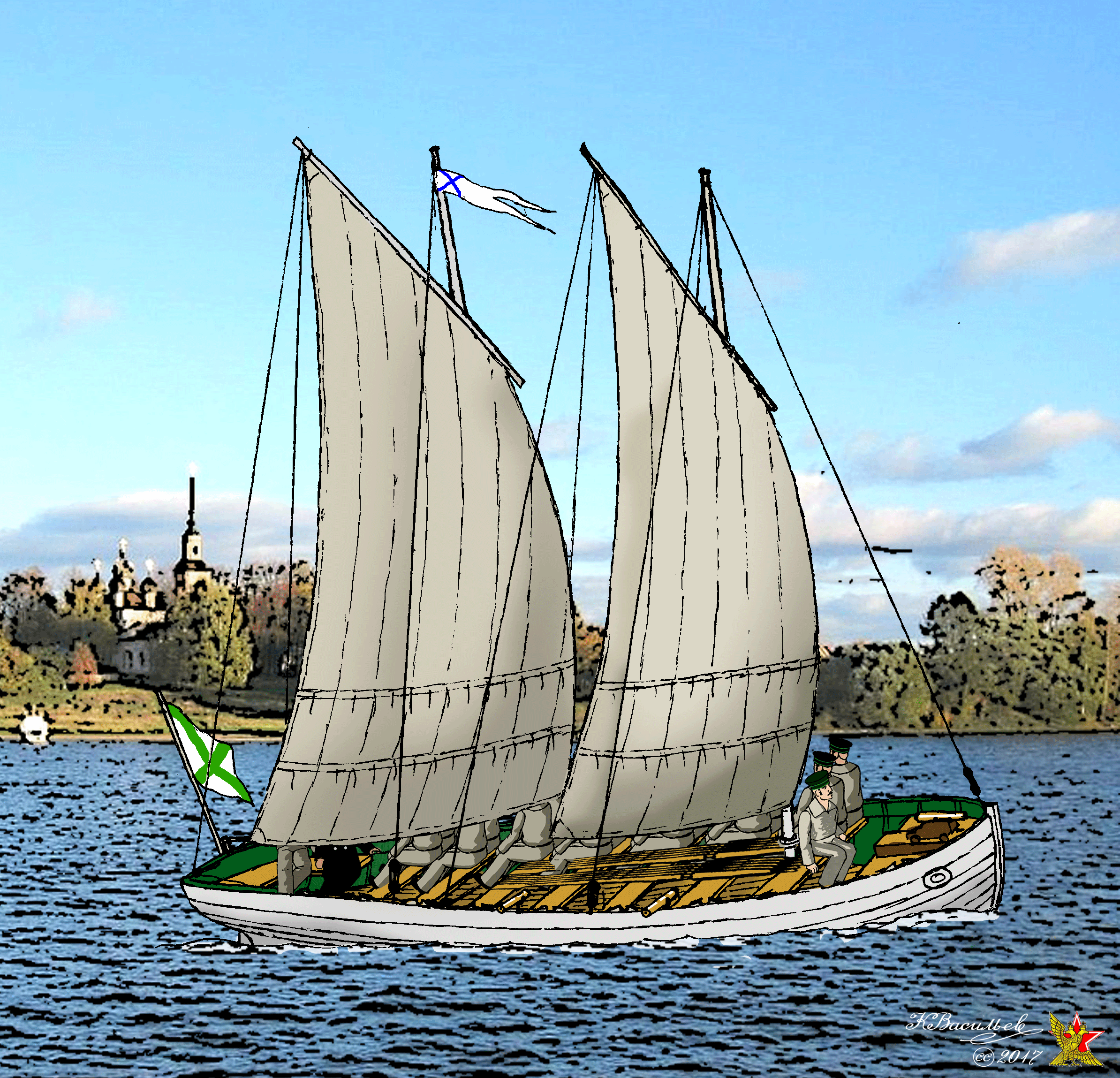 Российская империя; Главное управление путей сообщения. Воинская часть: 2-й полубатальон Военно-рабочего №9 батальона, 1829-33гг. Гардкоут обр.1829г.; Реконструкция по Высочайше утвержденному положению о втором полубатальоне Военно-рабочего № 9 батальона. Характеристики: Длина – ок. 10,5м Ширина – более 3м Весел – 14 Экипаж: Офицеров – 1; Унтер-офицеров – 1; Рядовых – 15 Вооружение: Погонная 1-но фунтовая пушка – 1 Фальконеты 1-но фунтовые – 4 Ружья - 11 Источник: Полное собрание законов Российской империи (ПСЗРИ) – собр.2. №3210 от 2 октября 1829г.